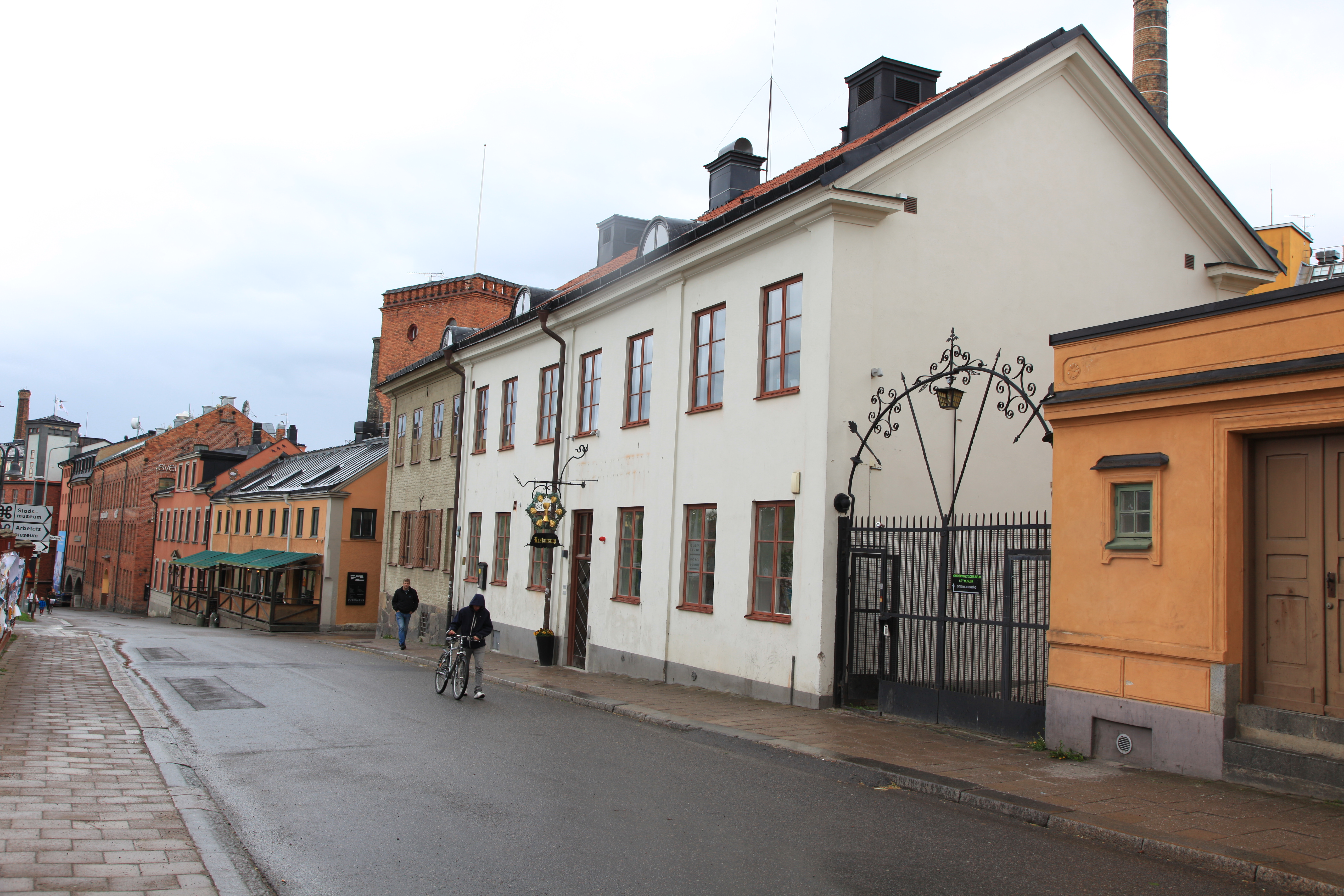 NIGA in Norrköping